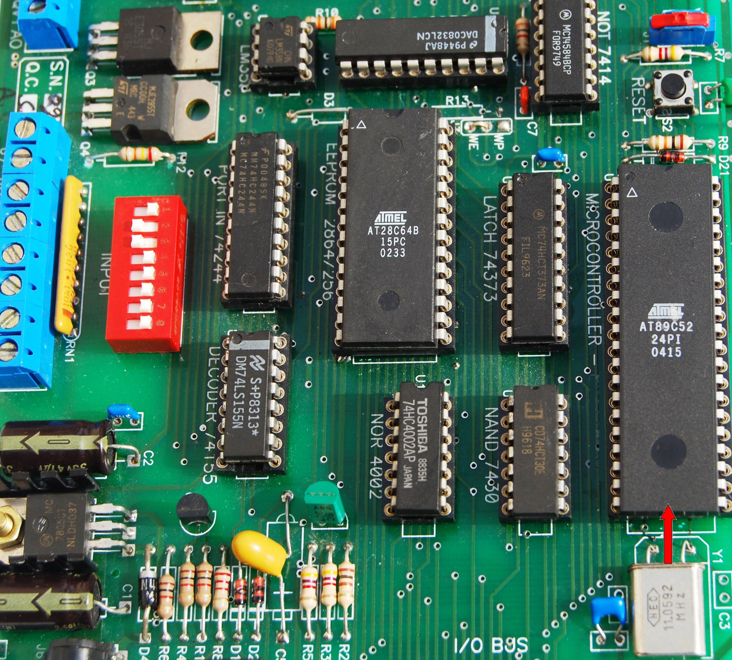 "רכיב ממשפחת המיקרו-בקרים 8051"